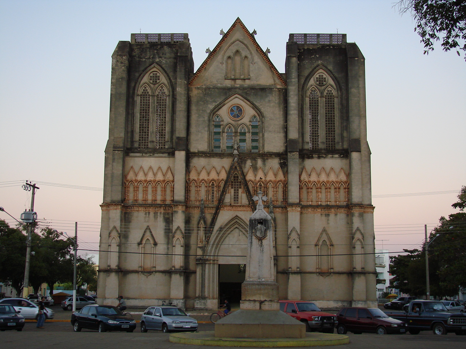 Catedral de São Luís, da Diocese de São Luís de Cáceres-MT. À frente, o Marco do Jaurú.